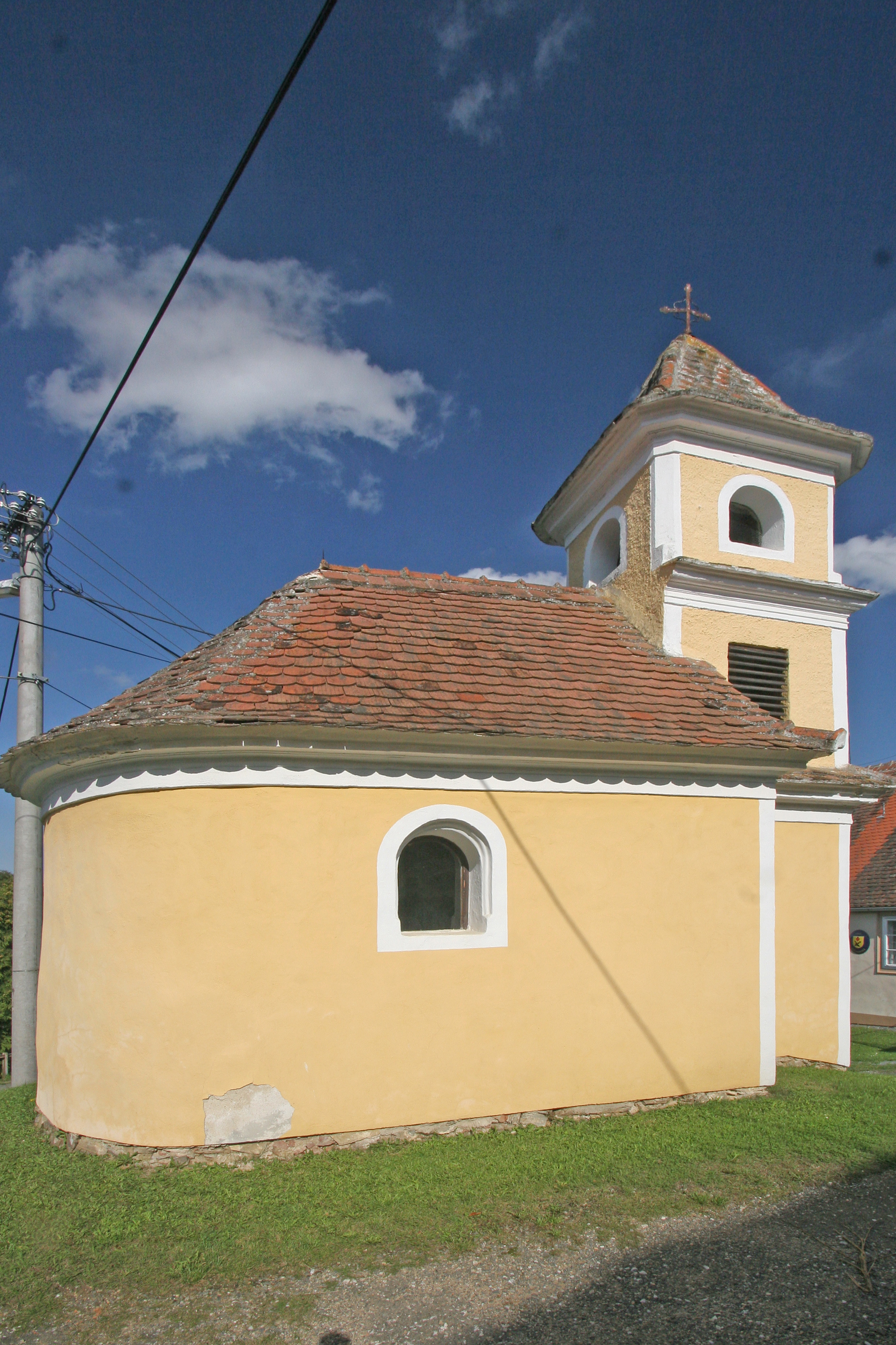 Oslnovice kaple1